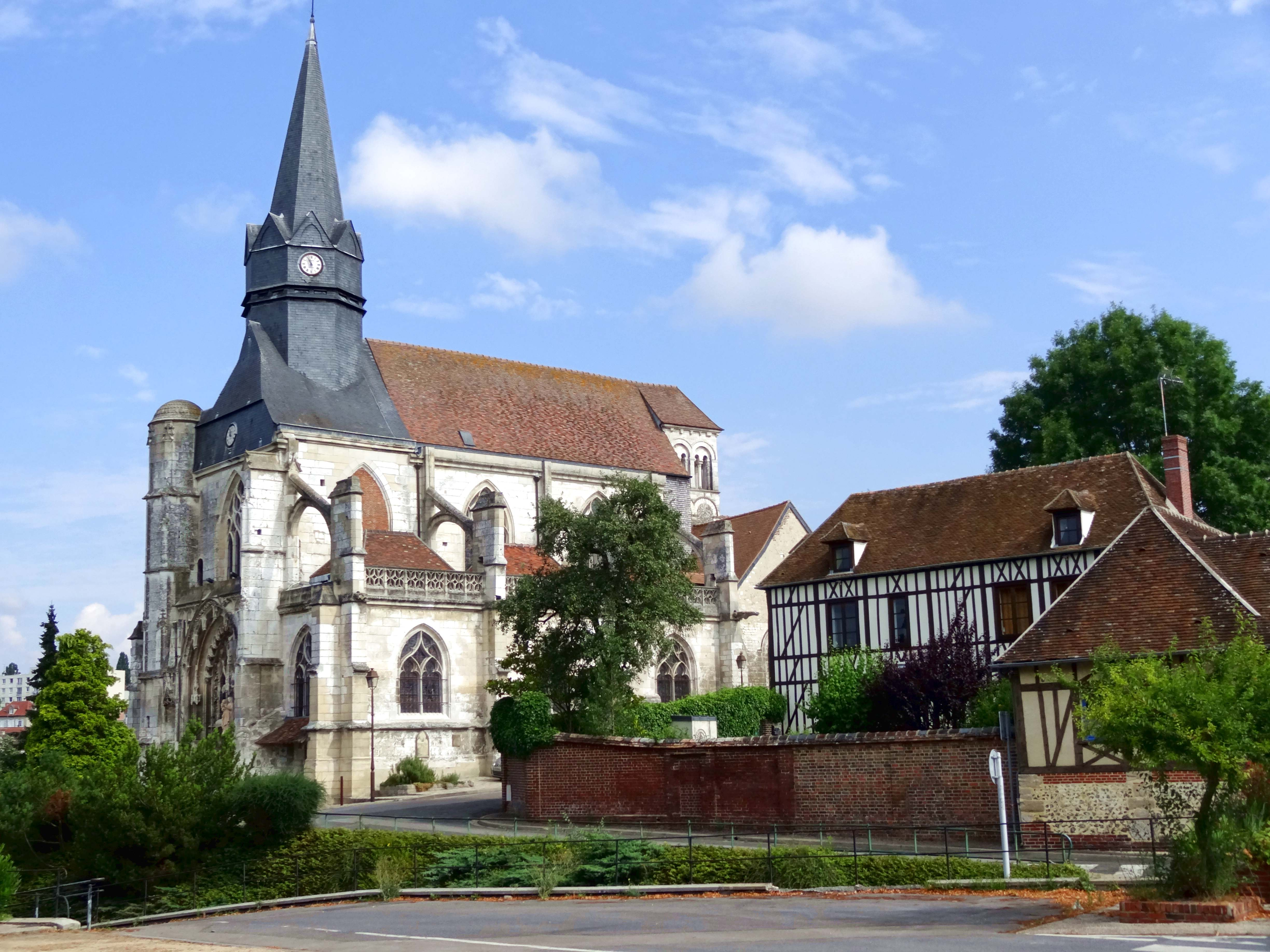 Église Notre-Dame de Marissel - voir titre.